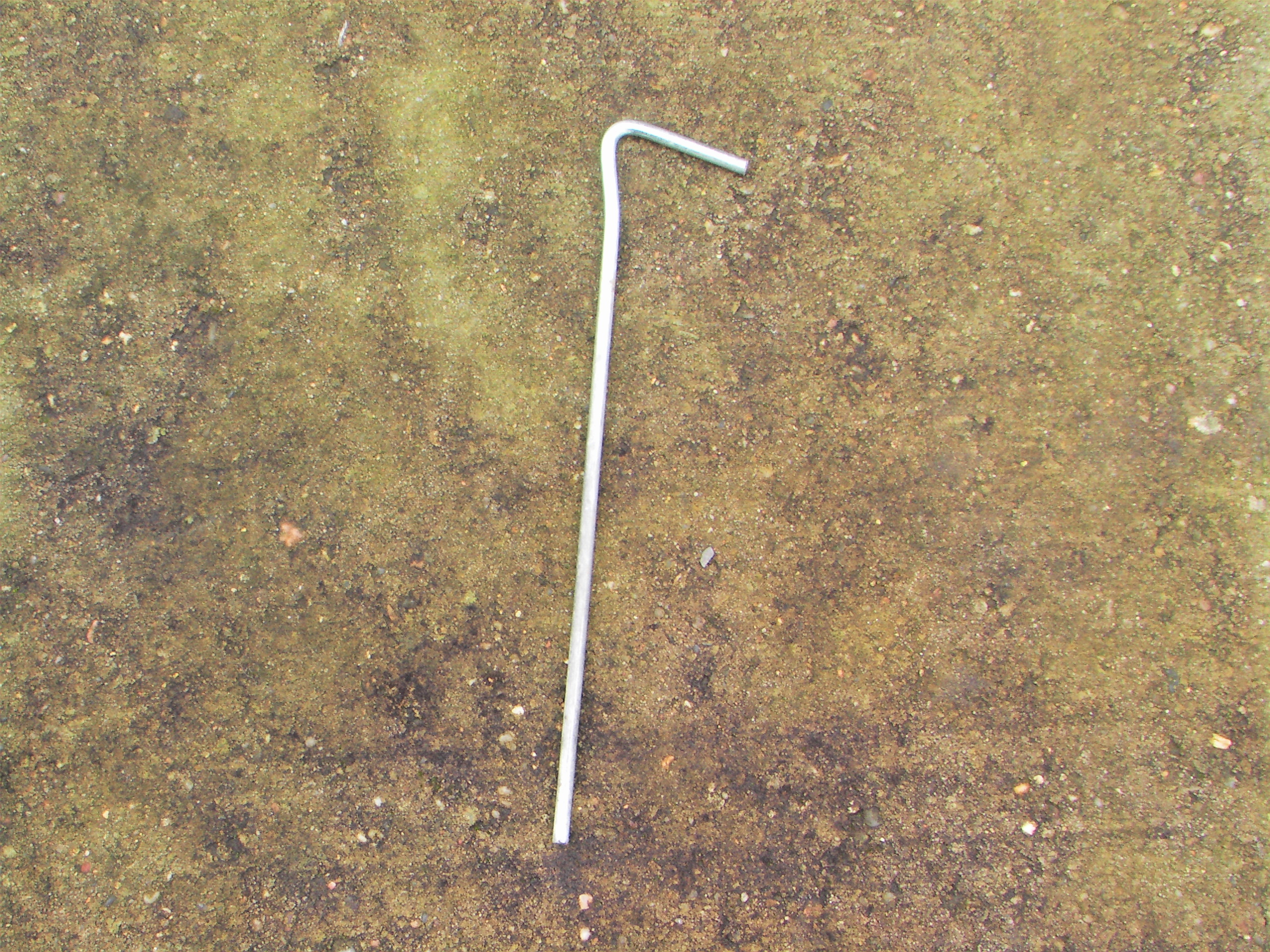 Zeltnagel